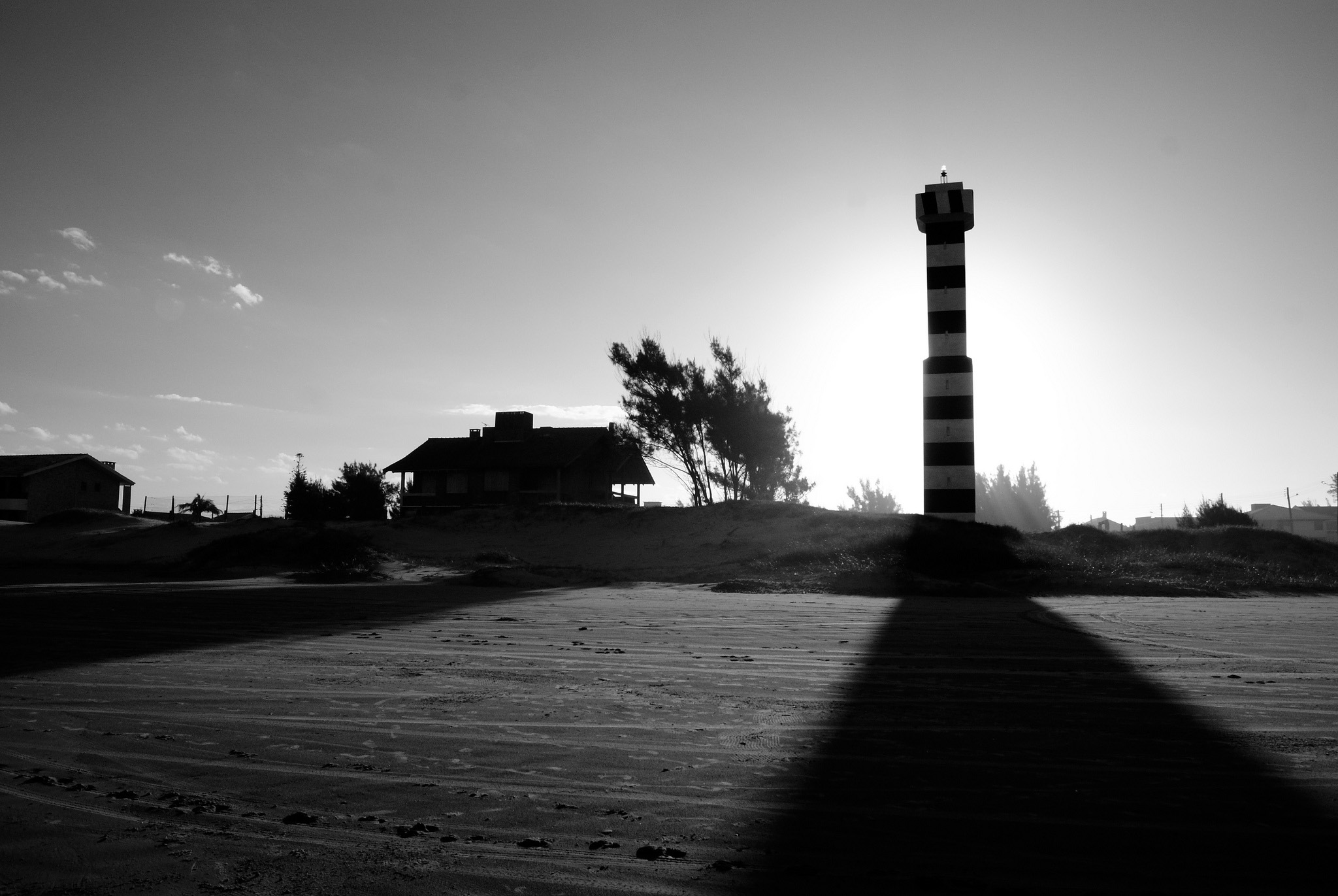 Tirado com uma Canon 60D lente 18-200mm